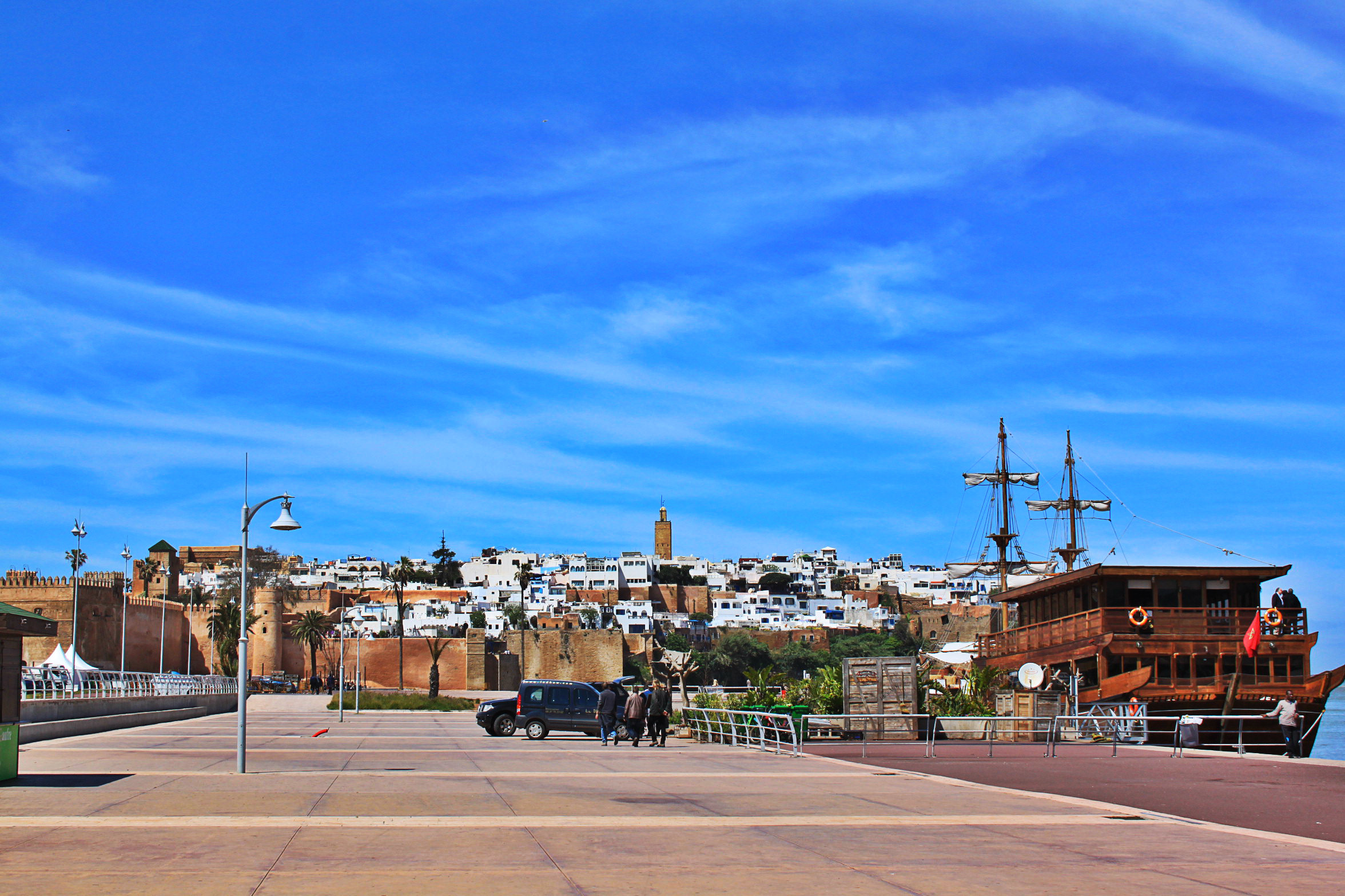 Kasbah des Oudaya